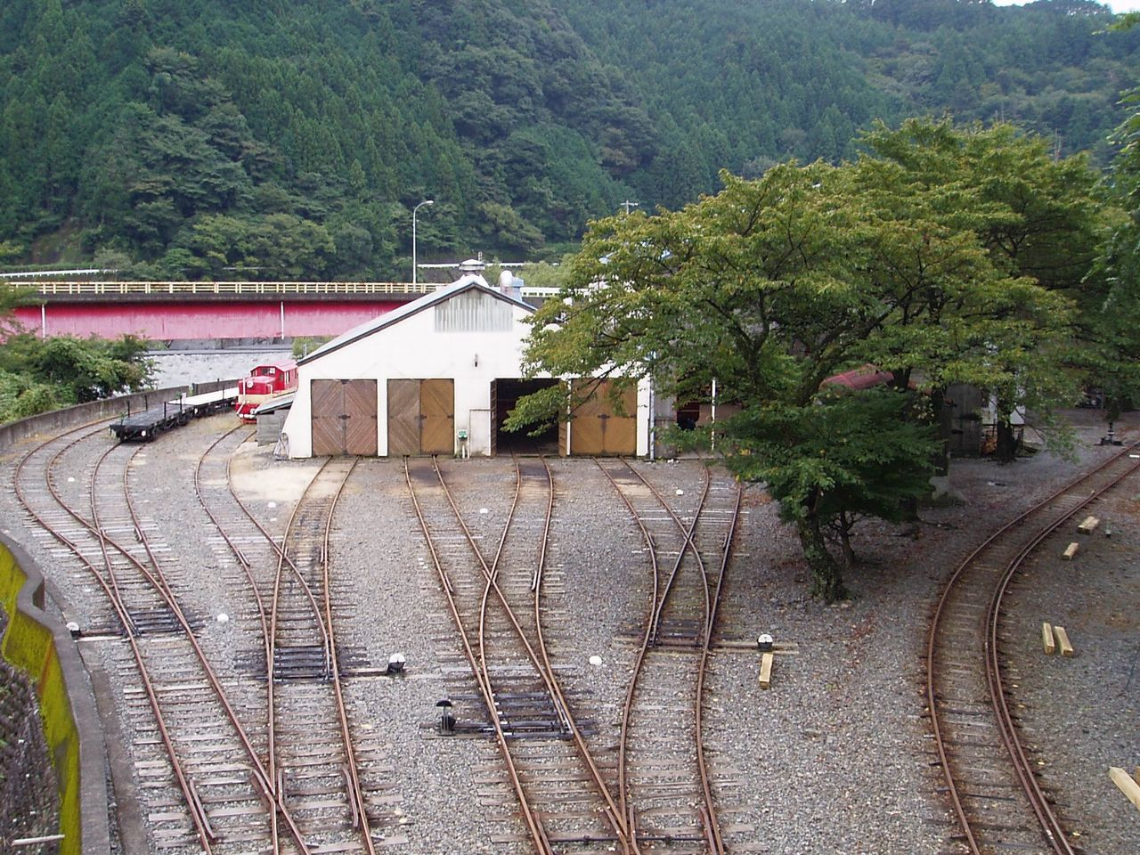 Oigawa Railway rail yards, Kawane-Ryōgoku Station, Shizuoka, Japan